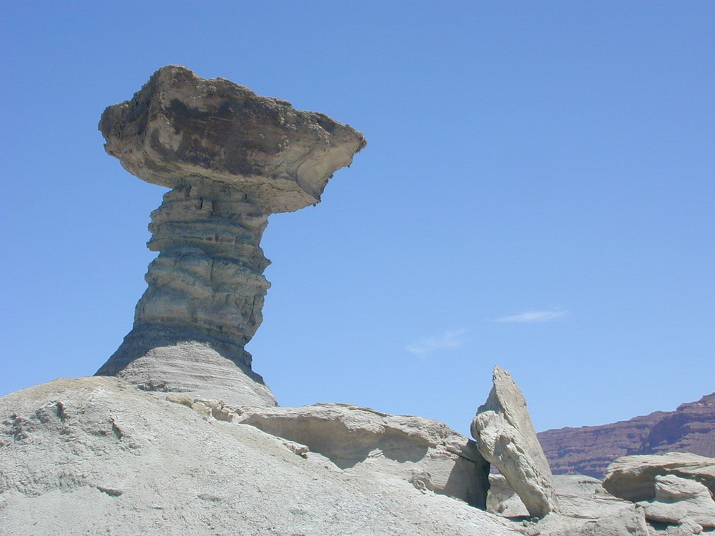 again